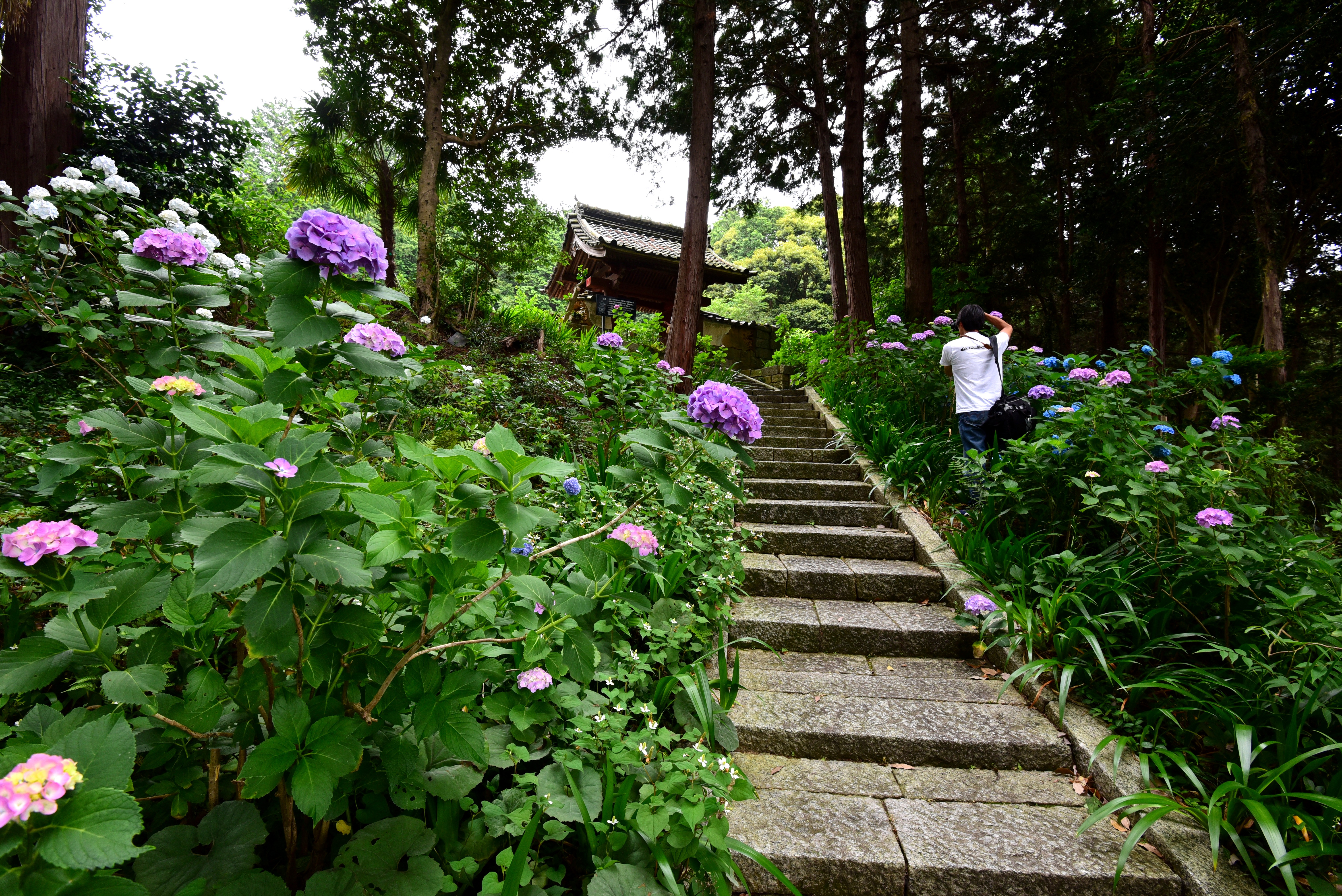 本光寺のあじさい